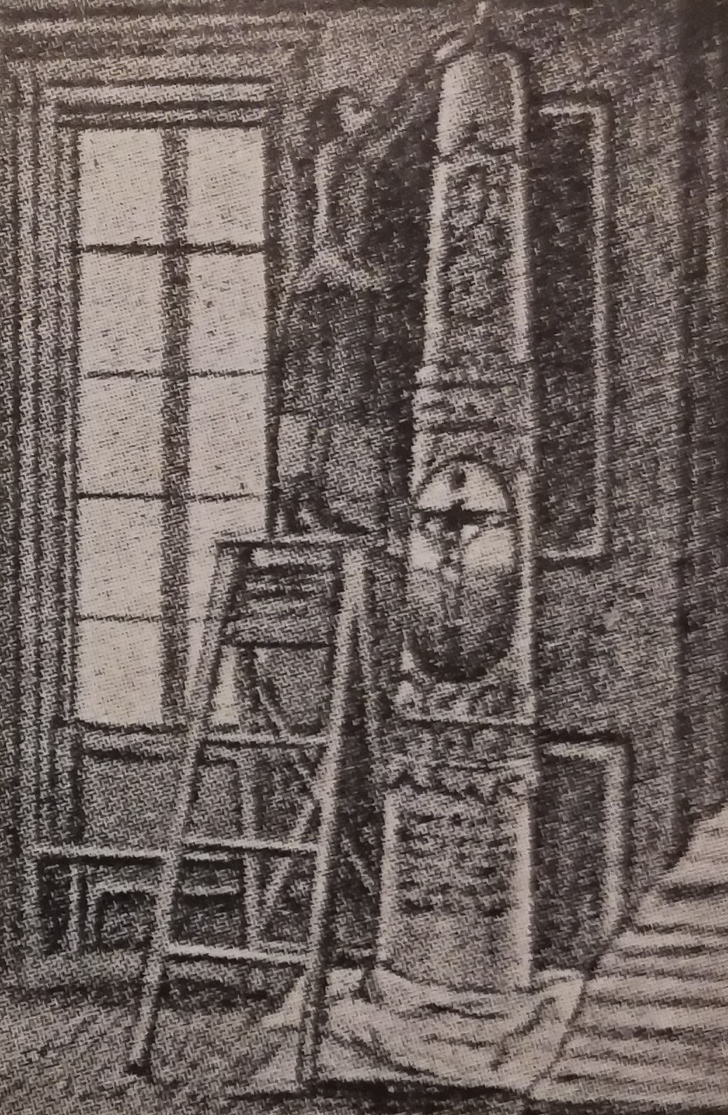 Иллюстрация свечи установленной в честь памяти Карузо в латвийском журнале 1923 года